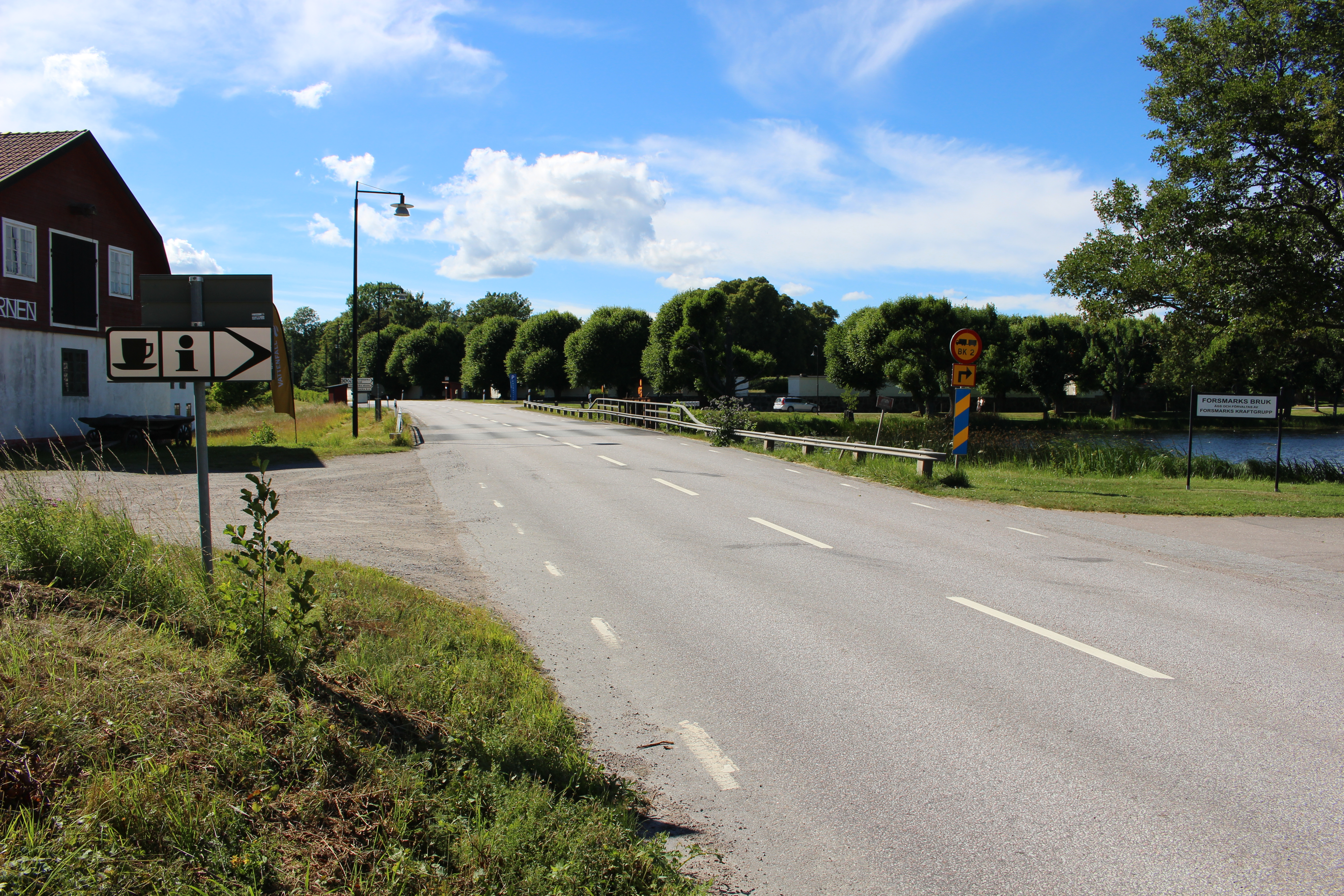 Riksväg 76 där den går förbi Forsmarks bruk.